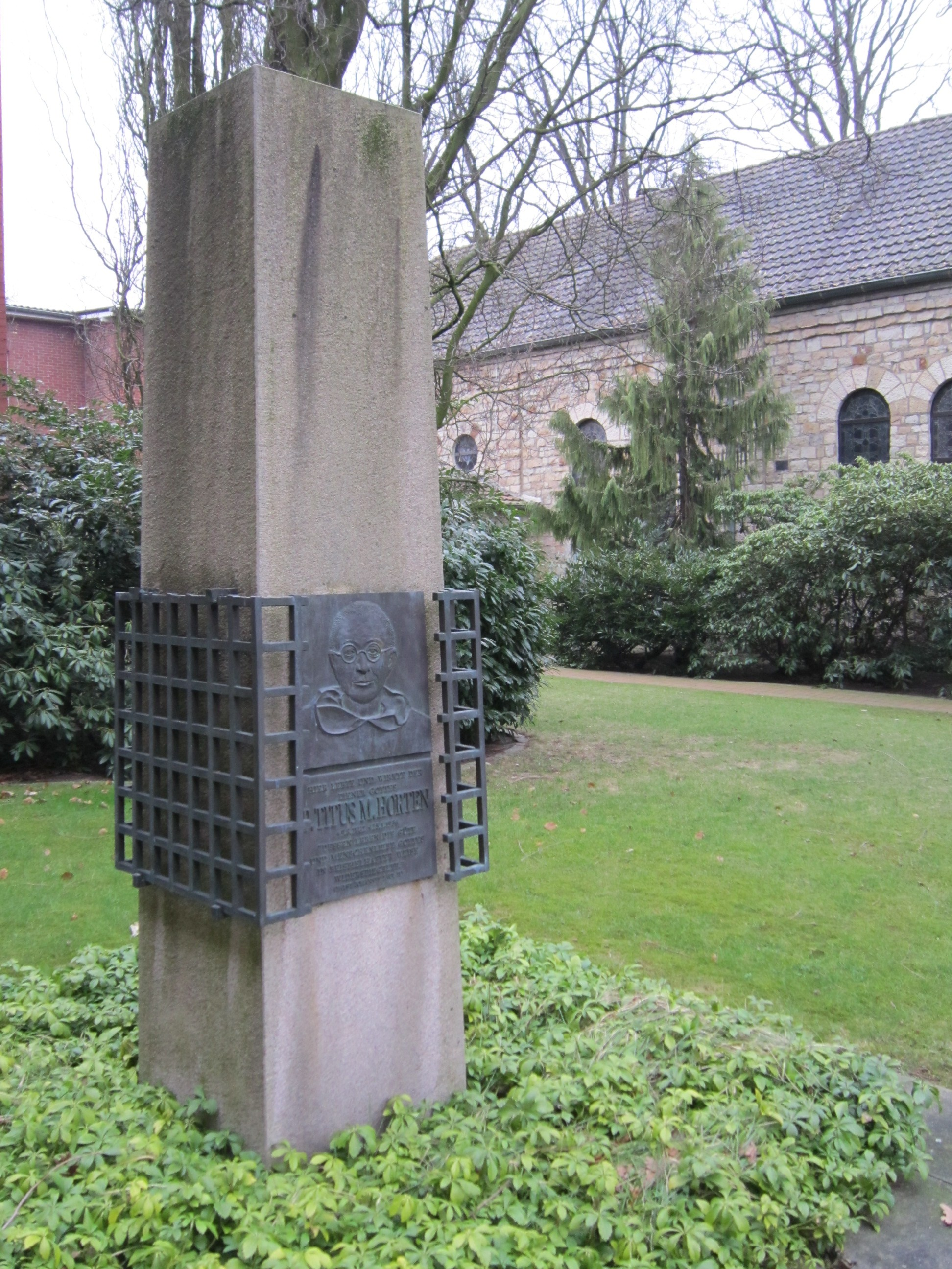 Gedenksäule im Kolleg St. Thomas Vechta-Füchtel für den Dominikanerpater Titus M. Horten